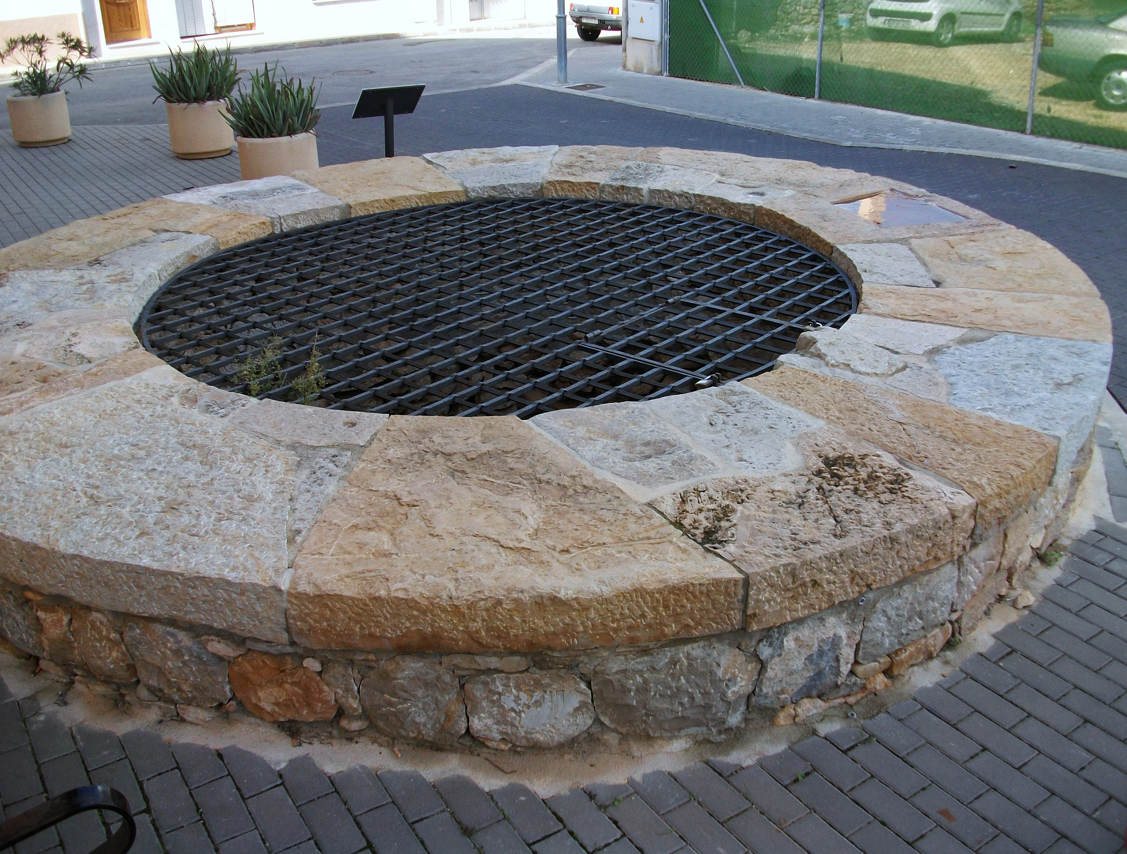 Pou de les Figueretes de Xaló. El pou es troba ubicat en els límits nord-orientals del nucli urbà, en el carrer que rep el topònim del Pou de les Figueretes. Aquest de planta circular abasta unes mesures considerables d'uns 4,70 m de diàmetre i una profunditat de 13 m. A grans trets la fàbrica de paredal de maçoneria de blocs calcaris distribuïts de manera aleatòria alineada formant filades horitzantals i travats en sec, en els paraments interns. La banda superior compta amb un brocal de forma circular, realitzat mitjançant la tècnica de la maçoneria on les lloses calcàries estan travades amb morter de calç i grava de riu, i ben encarades de forma rectangular. La boca del pou quedava coberta mitjançant un sistema de protecció d'enreixat metàl·lic i de fusta que cobria gran part l'obertura de l'estructura, amb l'objectiu de garantir la seguretat en les diferents activitats que es dien a terme. Malgrat que l'origen d'aquest element és anterior, les primeres al·lusions documentals que trobem daten de la primera meitat del segle XVII, encara que l'aspecte del pou tal i com el coneixem avui en dia, estaria situat en la primera meitat del segle XIX, moment en què es duen a terme obres de restauració del pou.